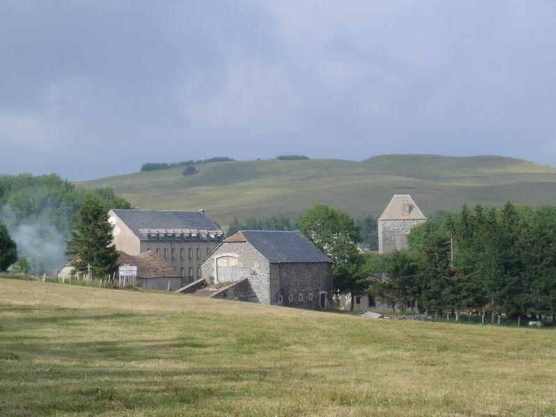 Aubrac le village et les trucs en arrière plan Source leybersurfeur